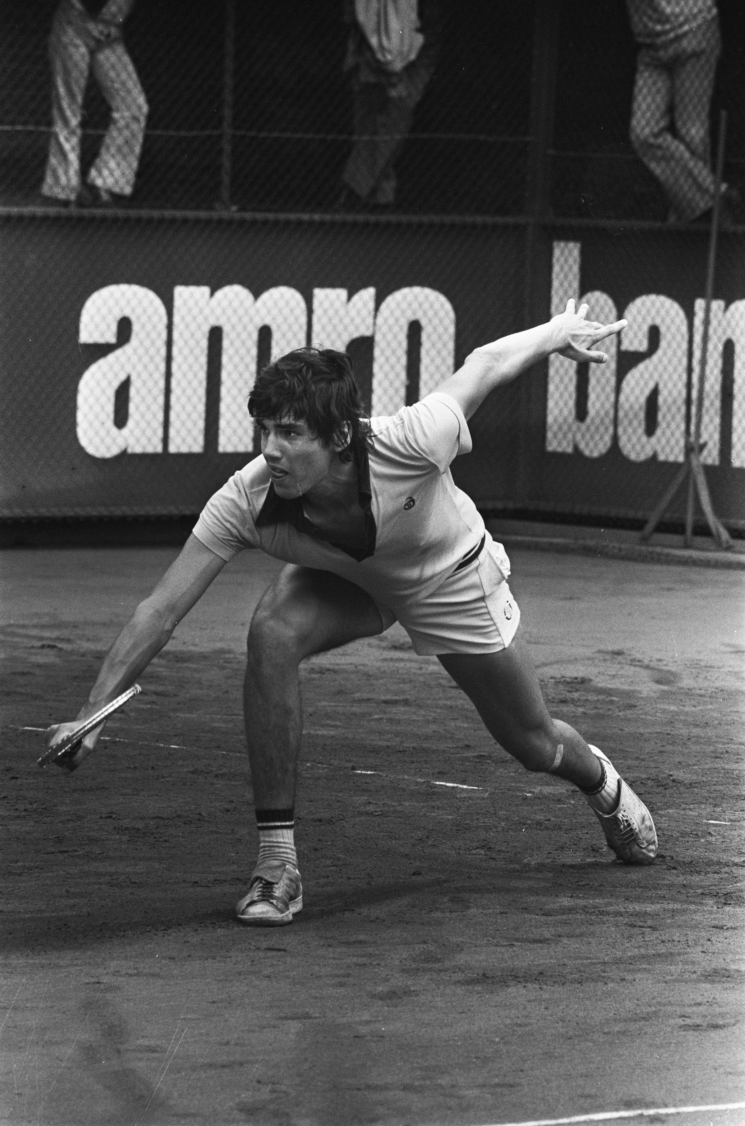 Collectie / Archief : Fotocollectie Anefo Reportage / Serie : Internationale tenniskampioenschappen 1975 op het Melkhuisje in Hilversum Beschrijving : Pecci uit Paraguay in aktie Datum : 17 juli 1975 Locatie : Hilversum-Noord-Holland Trefwoorden : sport, tennis, toernooien Persoonsnaam : Pecci, Victor Instellingsnaam : Melkhuisje, 't Fotograaf : Rob Croes / Anefo Auteursrechthebbende : Nationaal Archief Materiaalsoort : Negatief (zwart/wit) Nummer archiefinventaris : bekijk toegang 2.24.01.05 Bestanddeelnummer : 928-0539